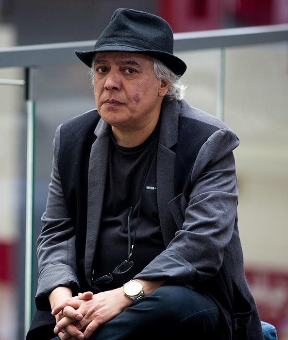 سیروس الوند در سی و پنجمین جشنواره جهانی فیلم فجر